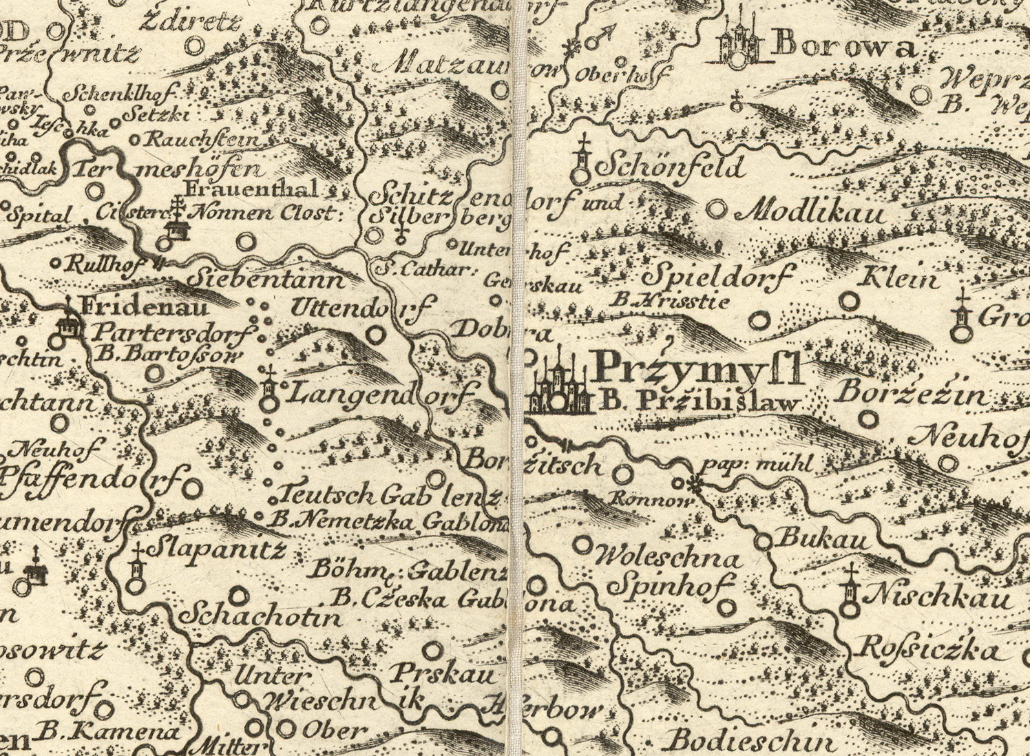 Přibyslav (Przymysl) na Müllerově mapě Čech z roku 1720. Mapová sbírka Historického ústavu AV ČR na CD-ROM, sekce XIX